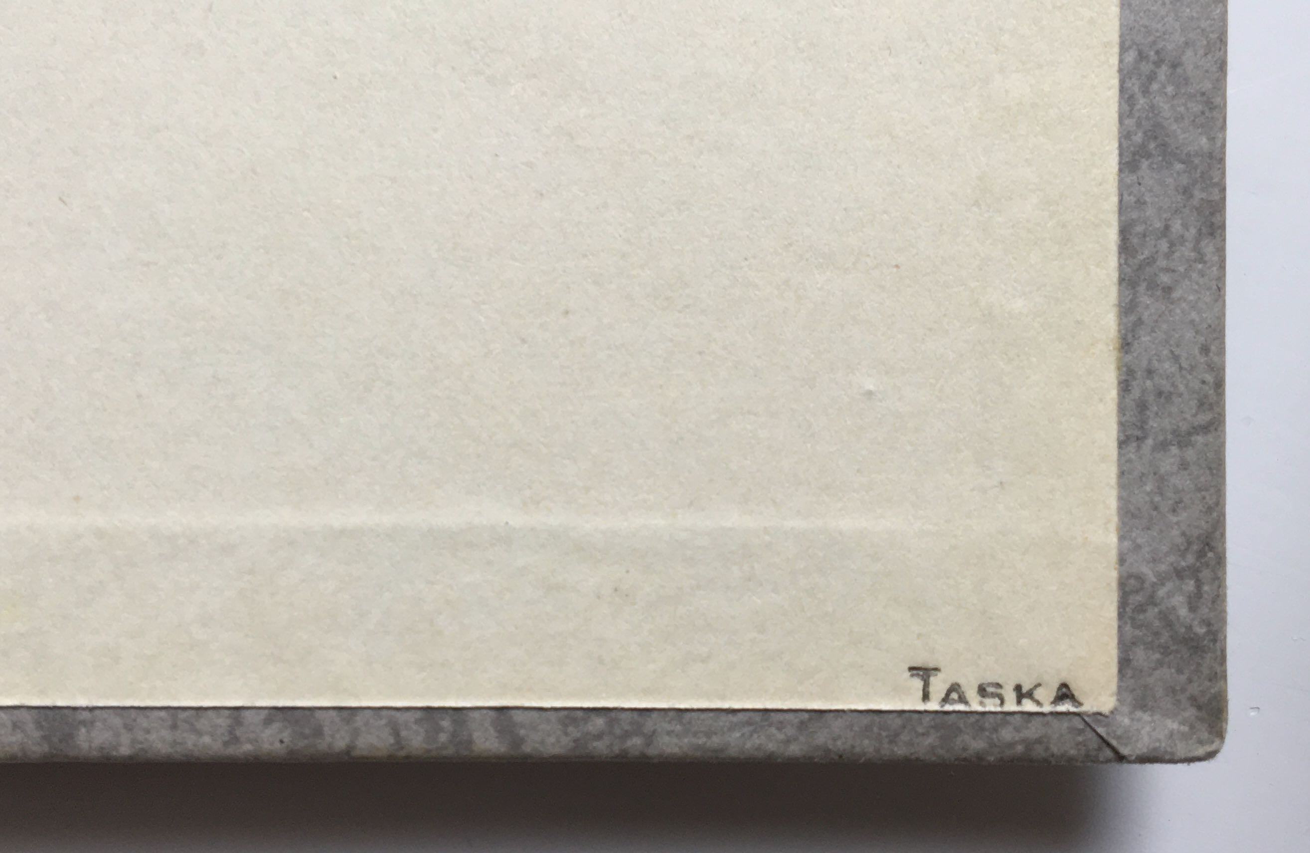 Taska köitemärgis väiksema fondiga